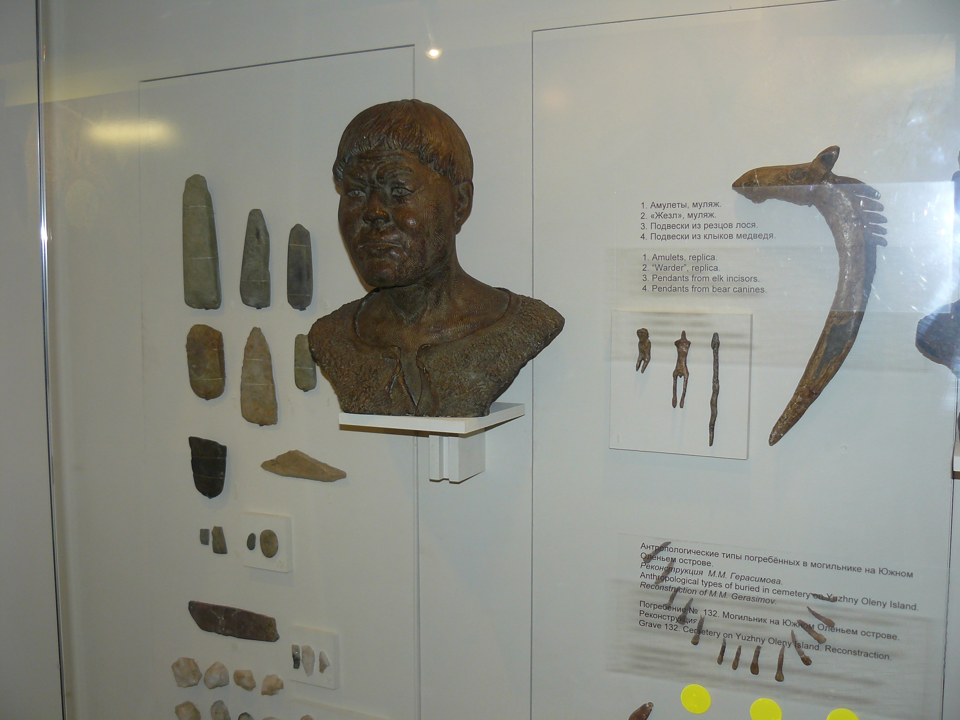 Фрагмент експозиції Національного музею Карелії